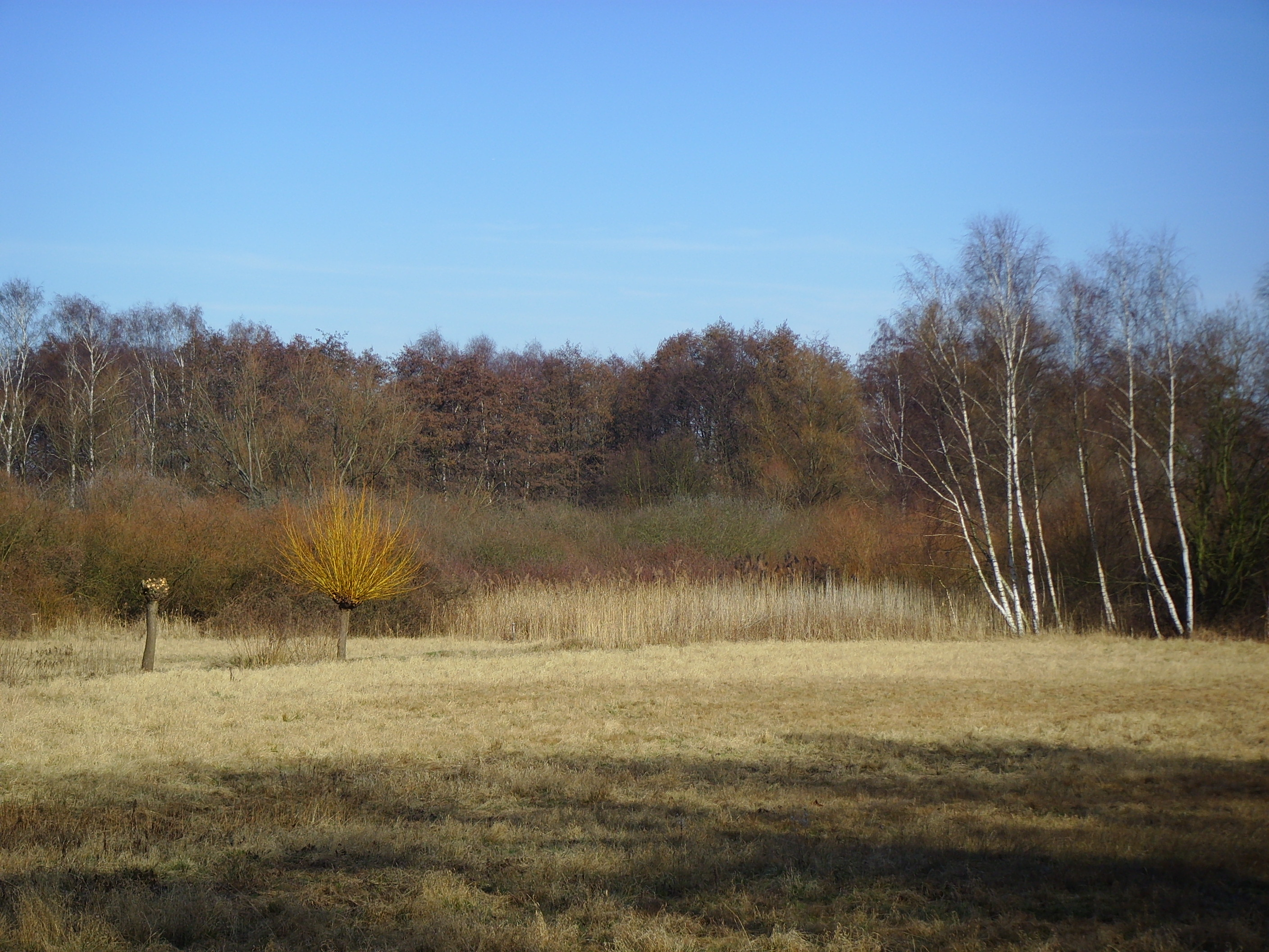 Naturschutzgebiet Riedwiese in Höhe der U-Bahnstation Riedwiese, Gemarkung Frankfurt am Main-Niederursel an der Grenze zu F-Heddernheim